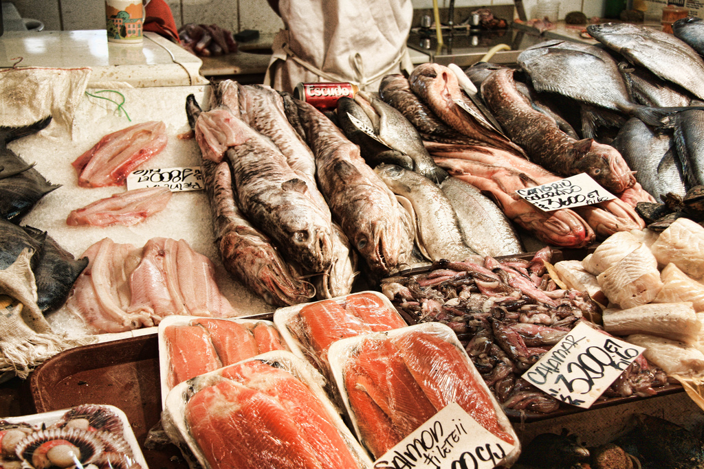 Venta de mariscos y peces terminal